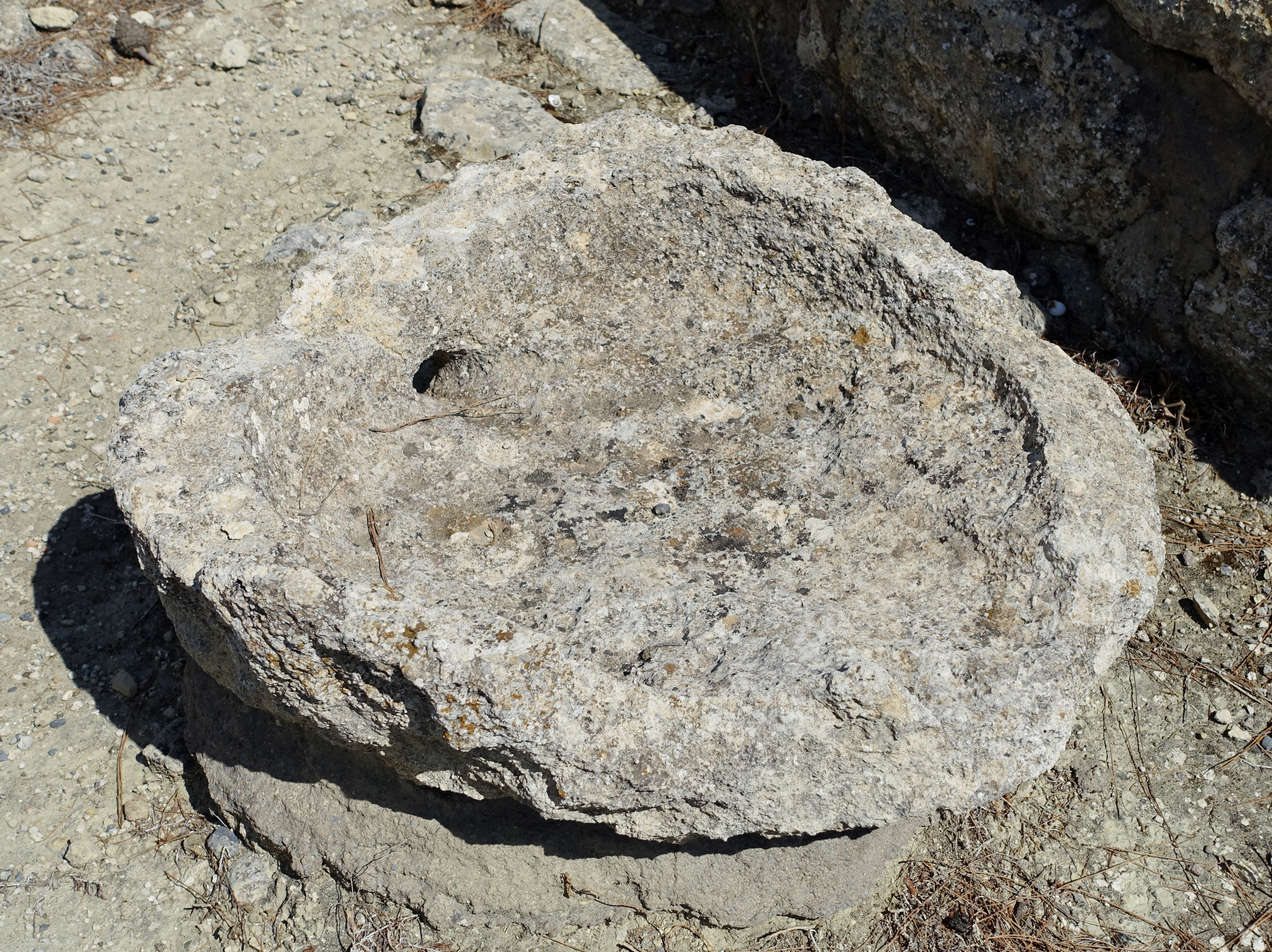 Ausgrabungsstätte der „Villa“ von Vathypetro (Βαθύπετρο), Gemeinde Archanes-Asterousia, Kreta, Griechenland